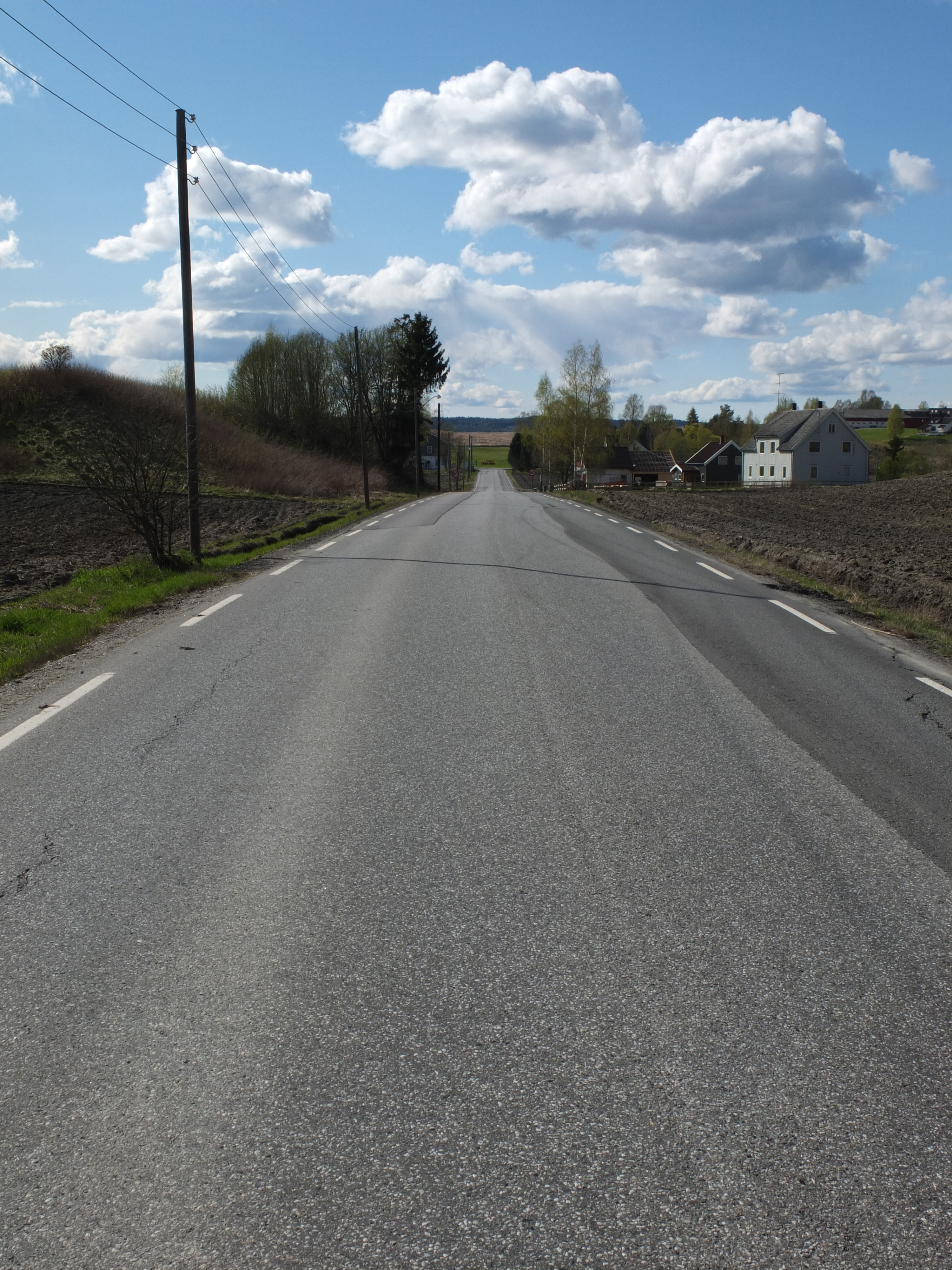 Fylkesvei 428